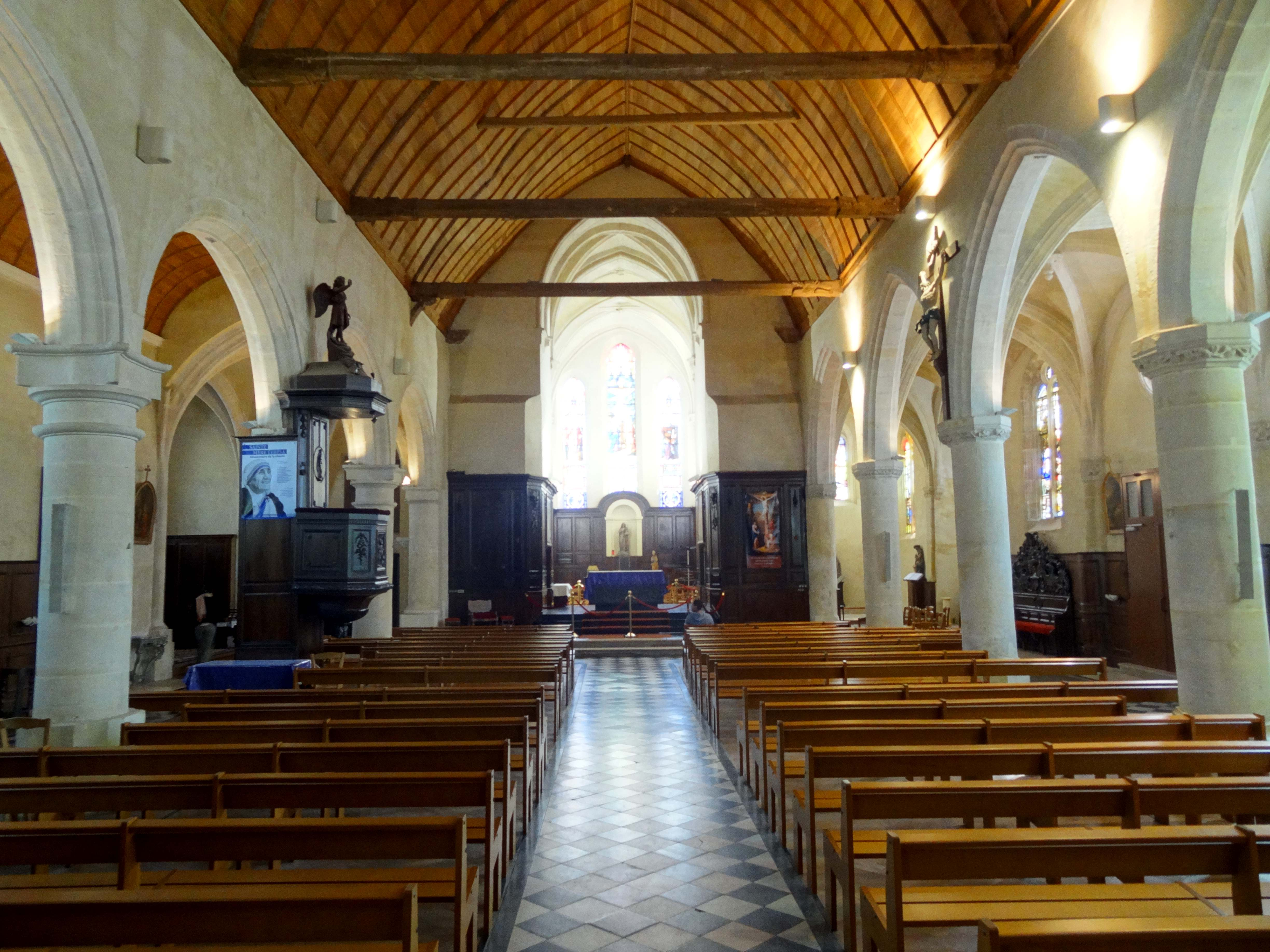 Intérieur de l'église - voir titre.